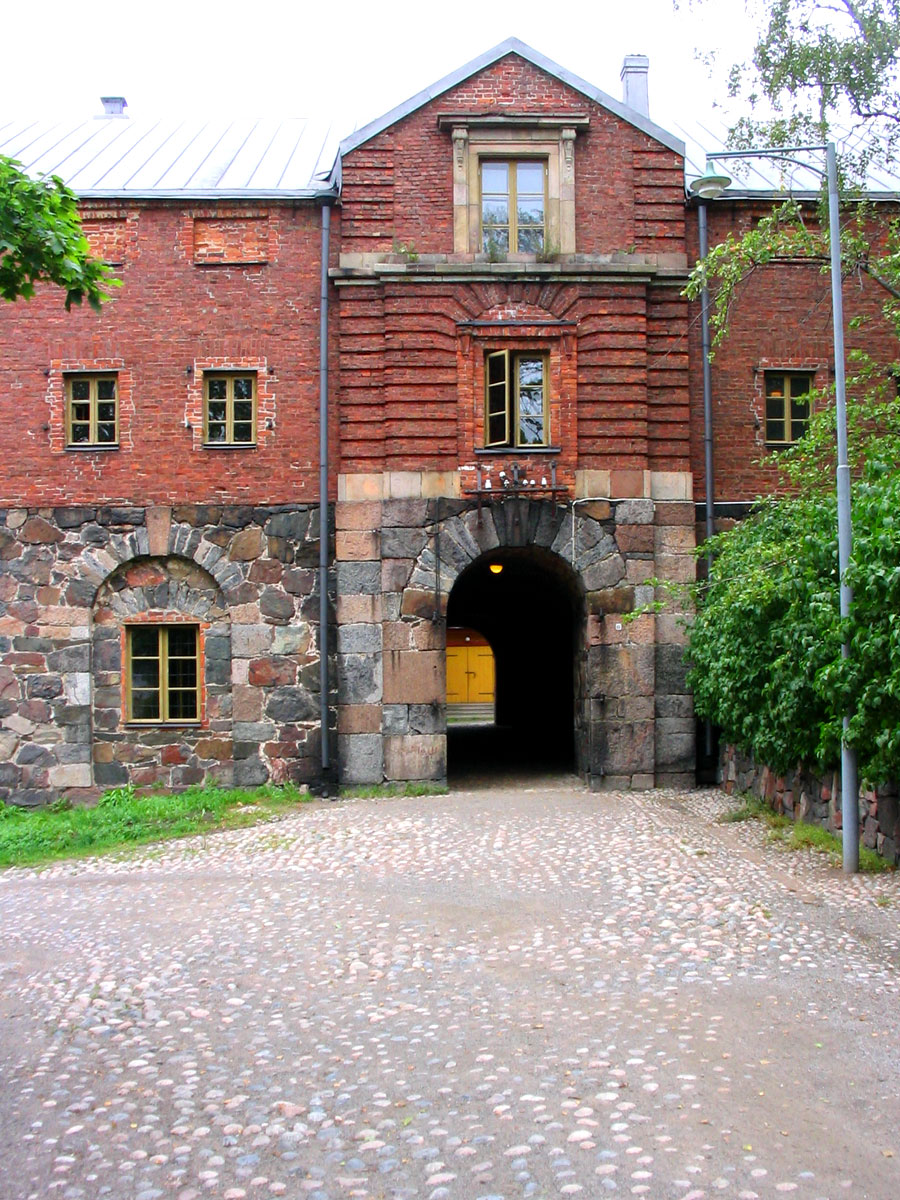 Suomenlinna C28, Kruunulinna Ehrensvärdin läntinen siipirakennus Pirunkirkko, Suomenlinna, Helsinki